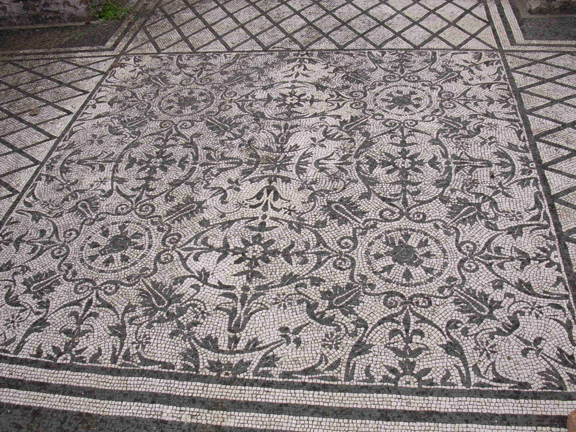 Mosaiques de l'hospitalia Auteur:Guilhem dulous